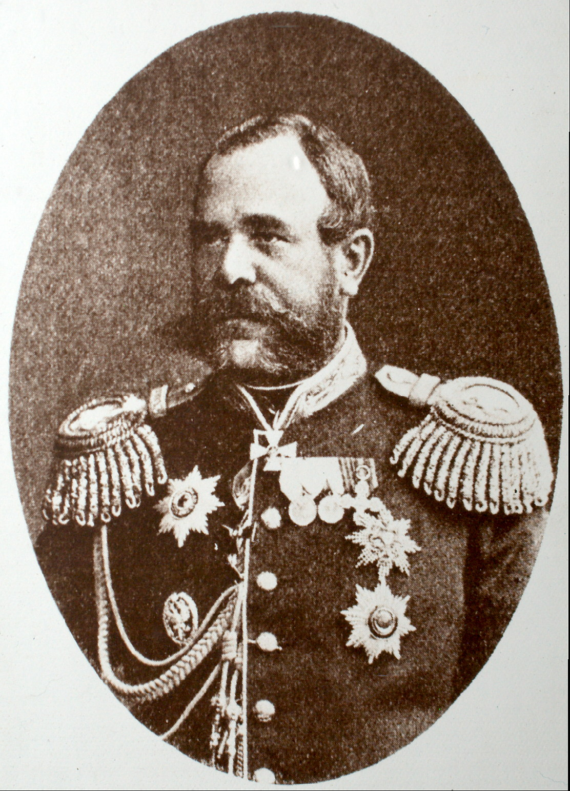 Николай Николаевич Обручев (1830-1904) — русский военный деятель, генерал-адъютант, генерал от инфантерии, Почетный член Петербургской Академии наук, профессор Академии Генштаба, писатель.